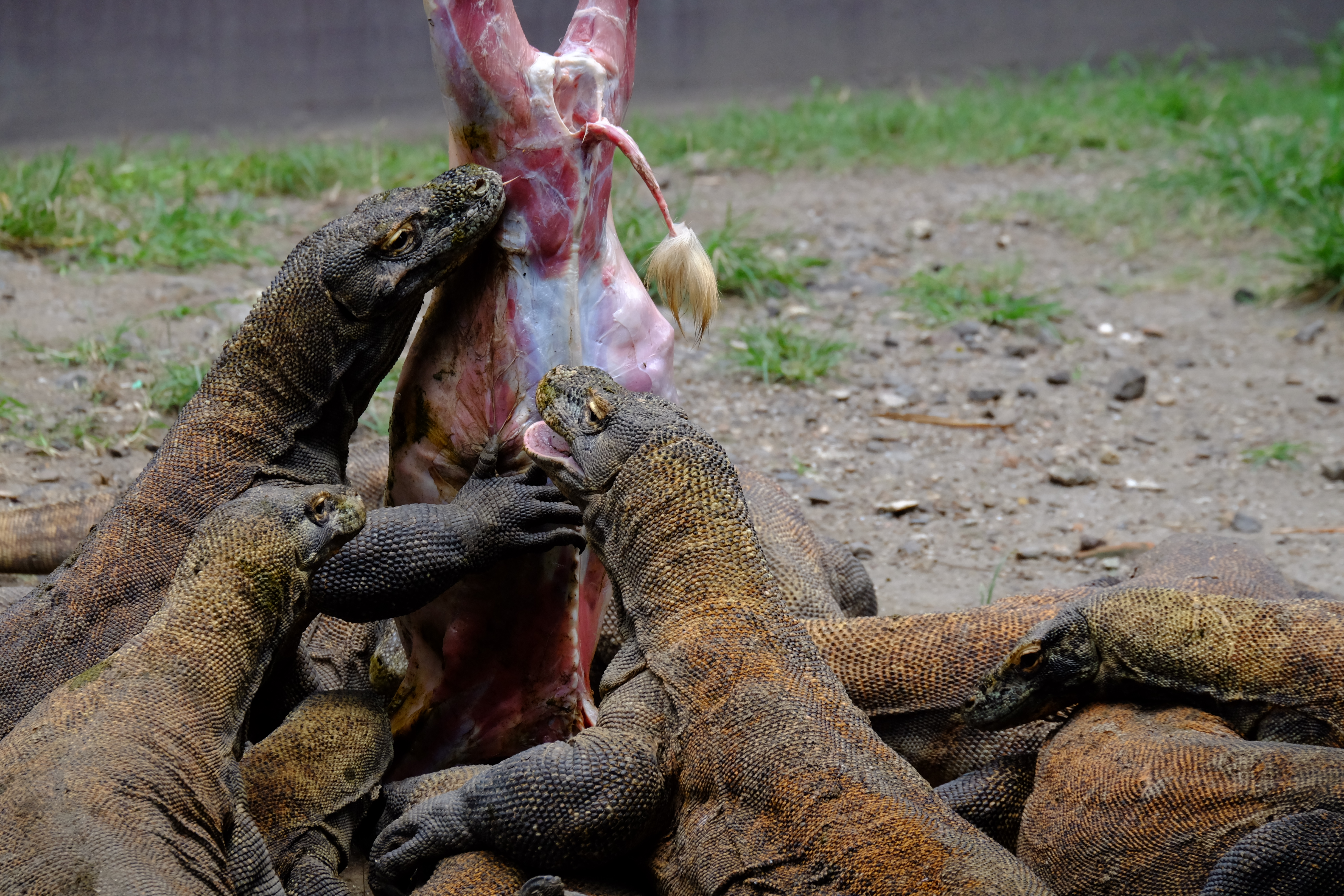 sekumpulan komodo yang sedang makan seekor kambing di kebun binatang surabaya